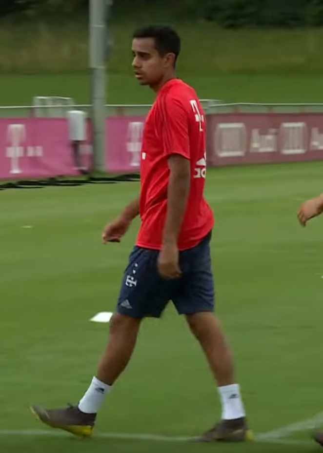 Sarpreet Singh, am 7. Juli 2019 beim Training auf dem Gelände des FC Bayern München